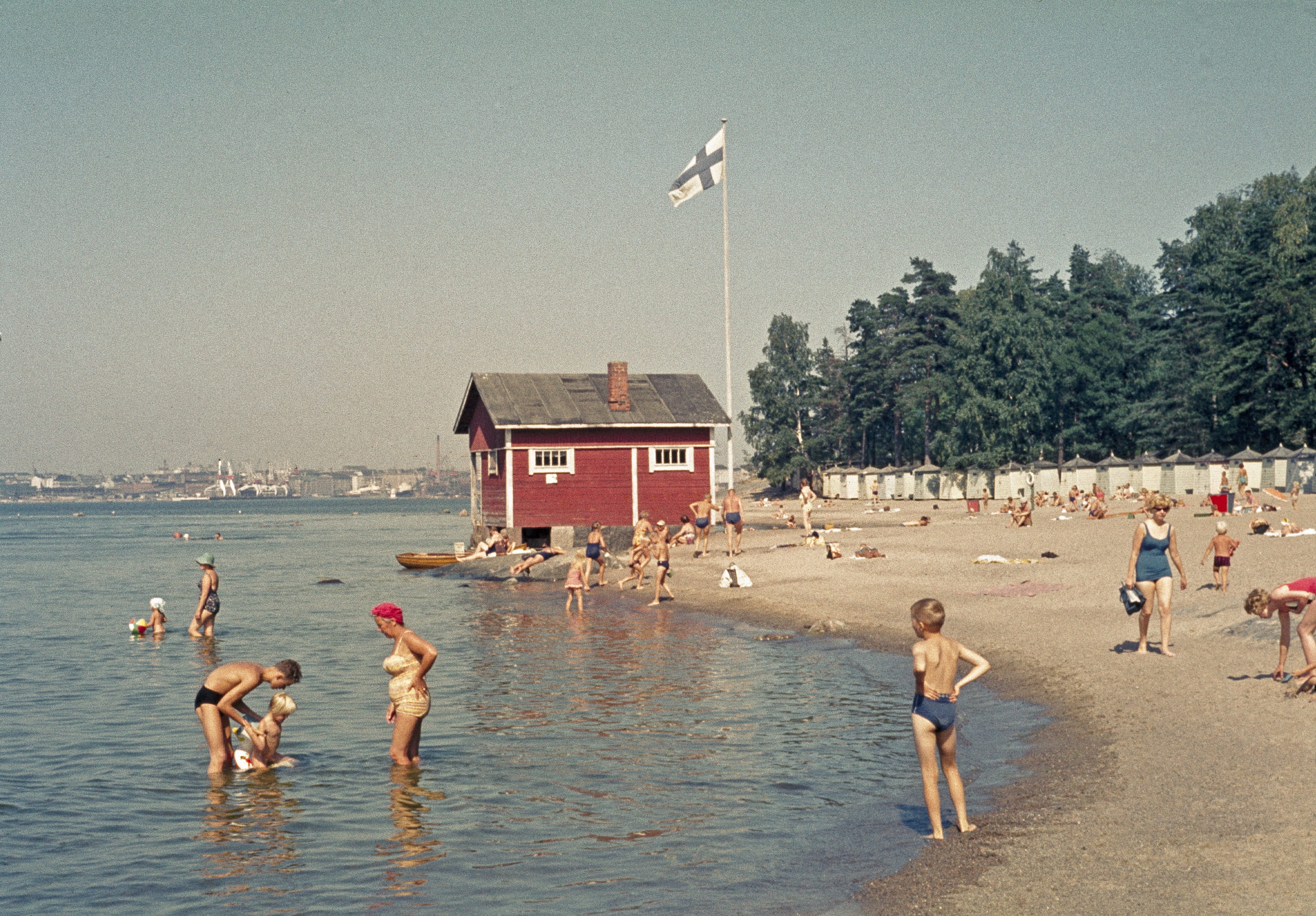 Pihlajasaari, uimarantaa.; dia, filmi, väri